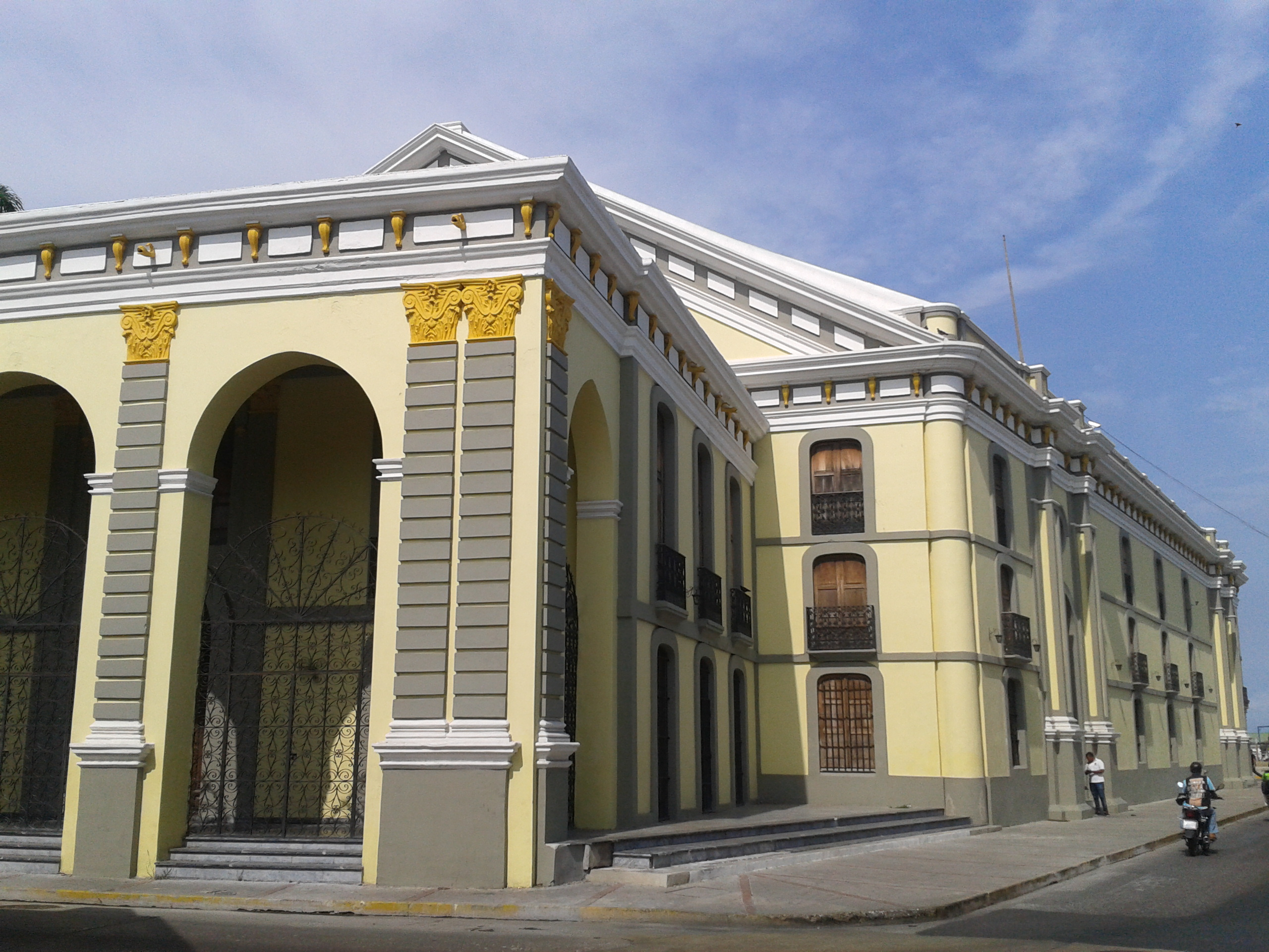 Teatro Municipal